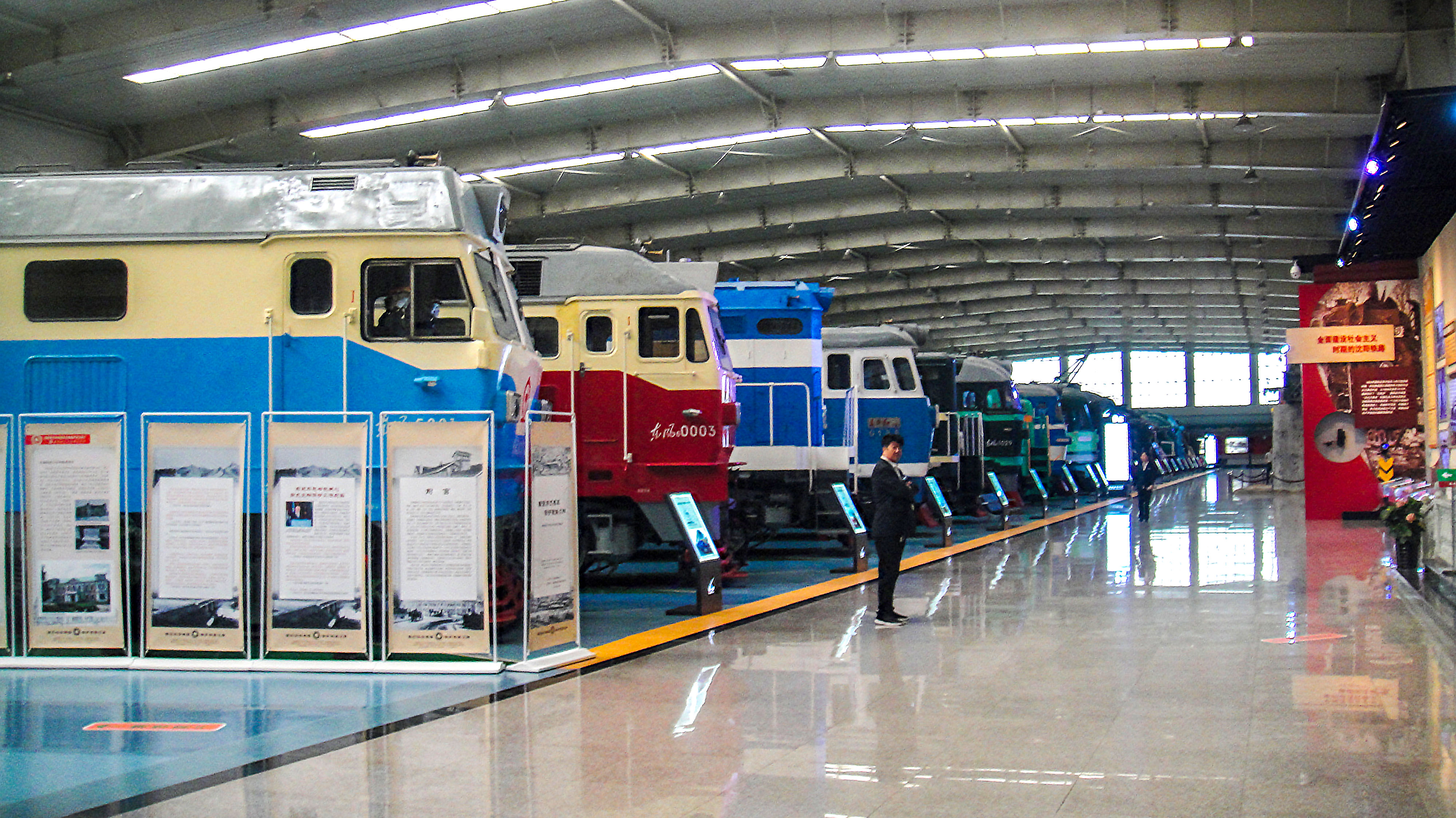 沈阳铁路陈列馆中的内燃机车